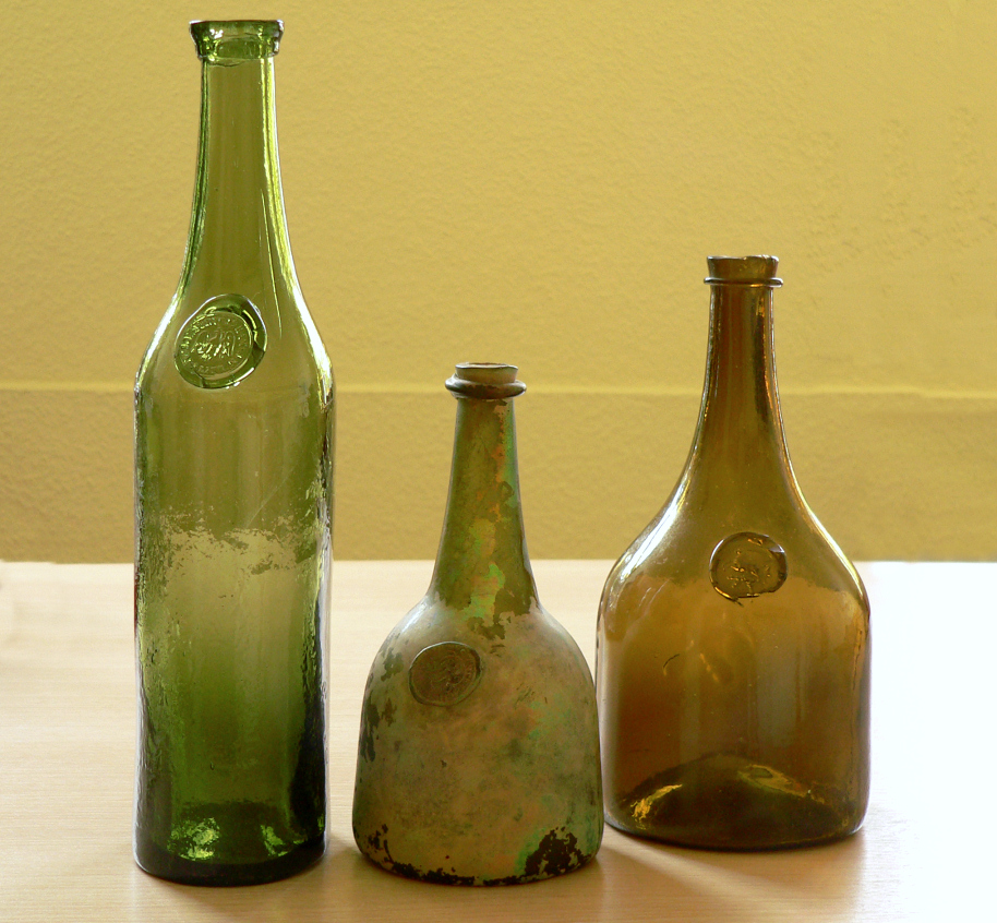 3 Flaschen aus Produktion der Glashütte Klein Süntel, nähere Beschriftung siehe File:Glashütte Klein Süntel 3 Flaschen.jpg